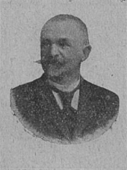 Jan Macháček (1841-1935), rakouský a český podnikatel a politik